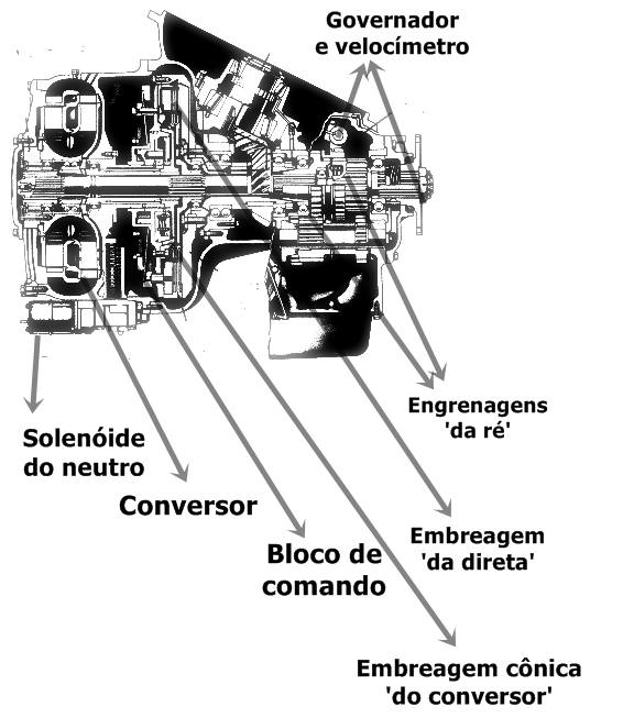 Caixa gearless desenhada por mim e fotografada. No caso é um corte que representa mais ou menos uma caixa Alisson